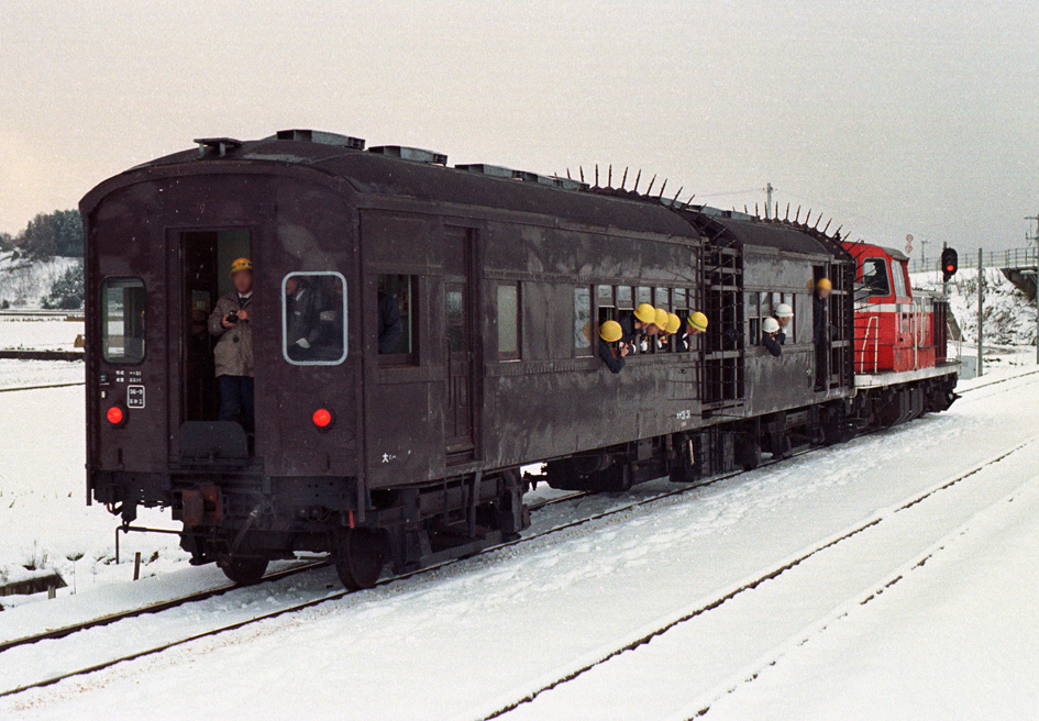 国鉄オヤ31 31 建築限界測定用試験車 建築限界試験列車（1985年、内山線、内子線測定）